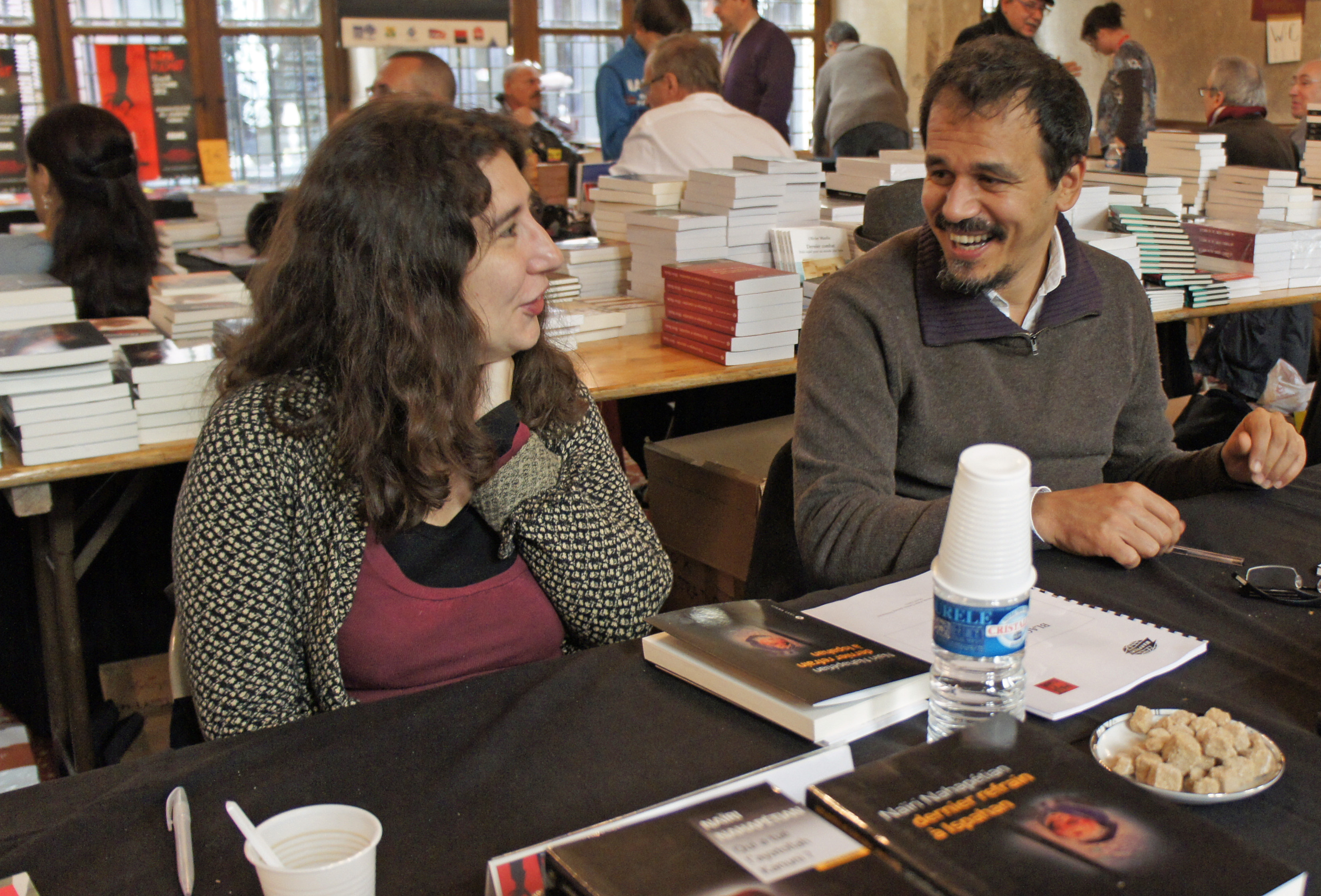 Les auteurs Naïri Nahapêtian et Karim Miské en préparation d'une séance de dédicace.